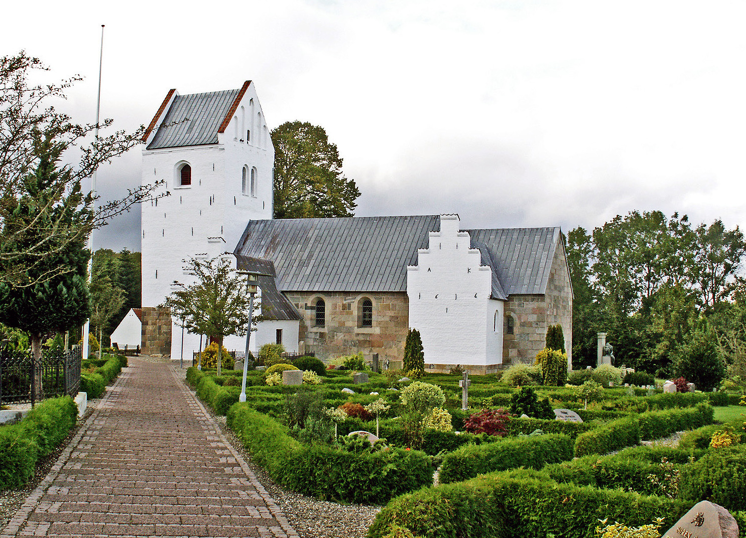 fra sydvest